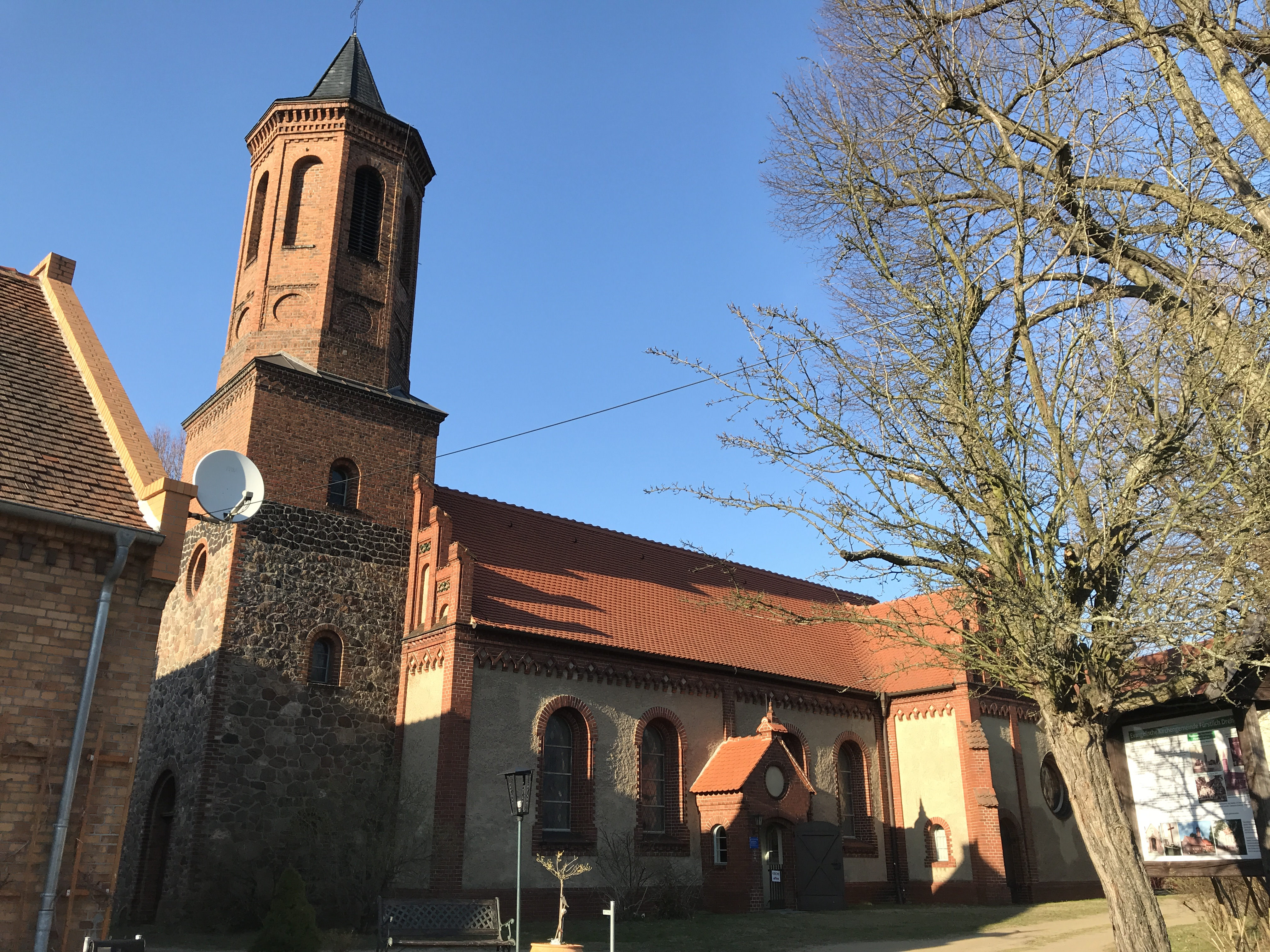 Die neogotische Saalkirche in Fürstlich Drehna wurde ursprünglich im Spätmittelalter errichtet und 1895 umfangreich umgebaut.